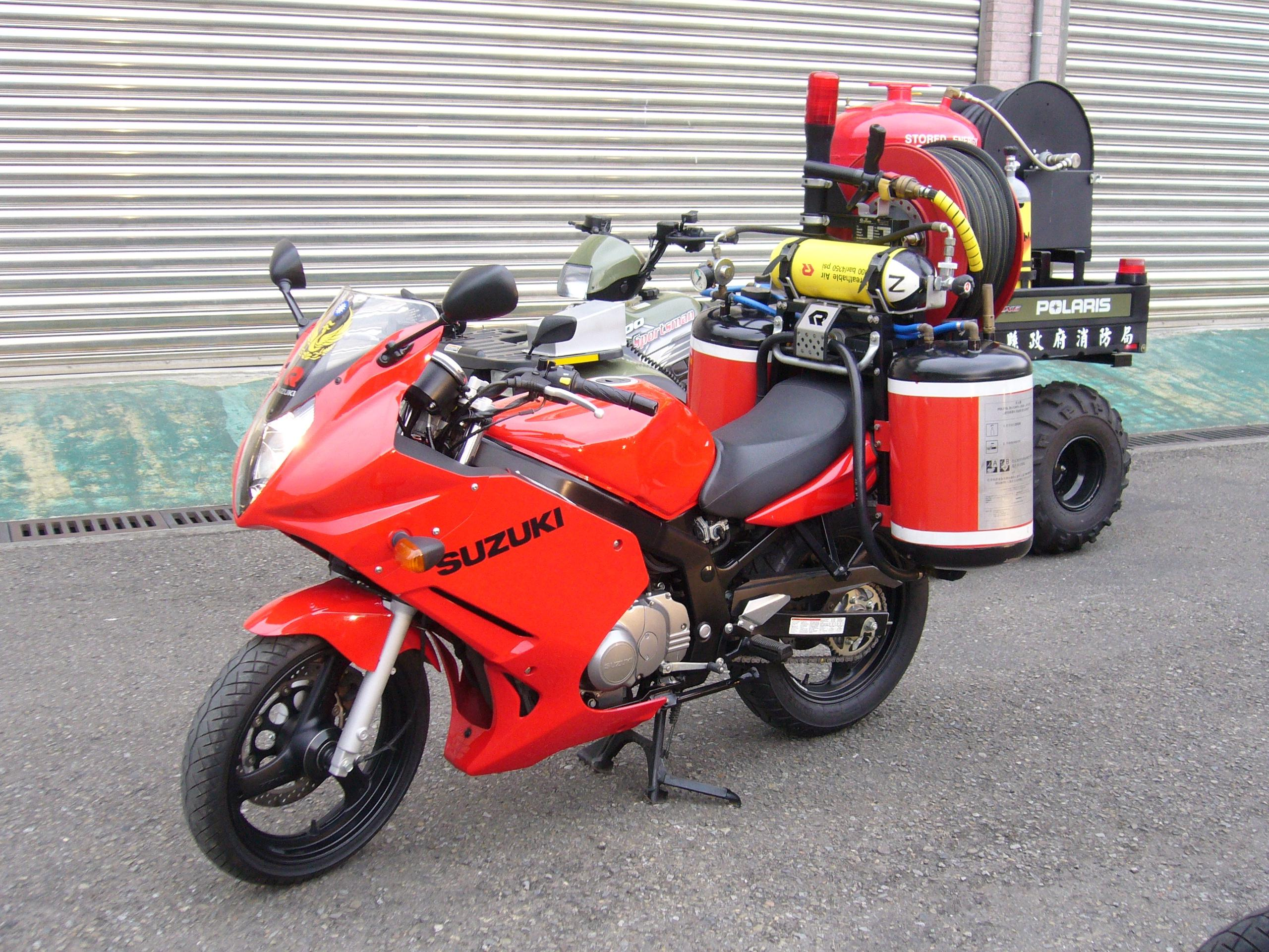 中華民國交通部補助臺北縣政府消防局購置的鈴木GS500滅火機車，用於雪山隧道火警。